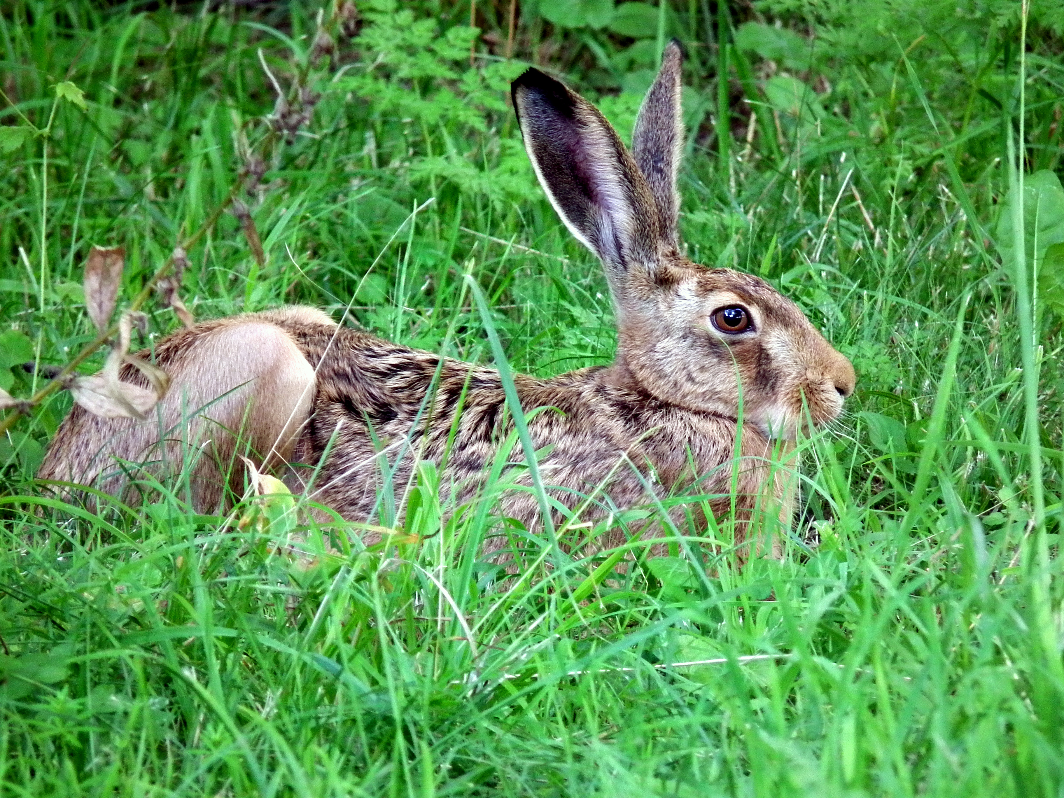 Feldhase (Lepus europaeus) auf dem Gelände des Botanischen Gartens in Heidelberg (Baden-Württemberg, Deutschland)